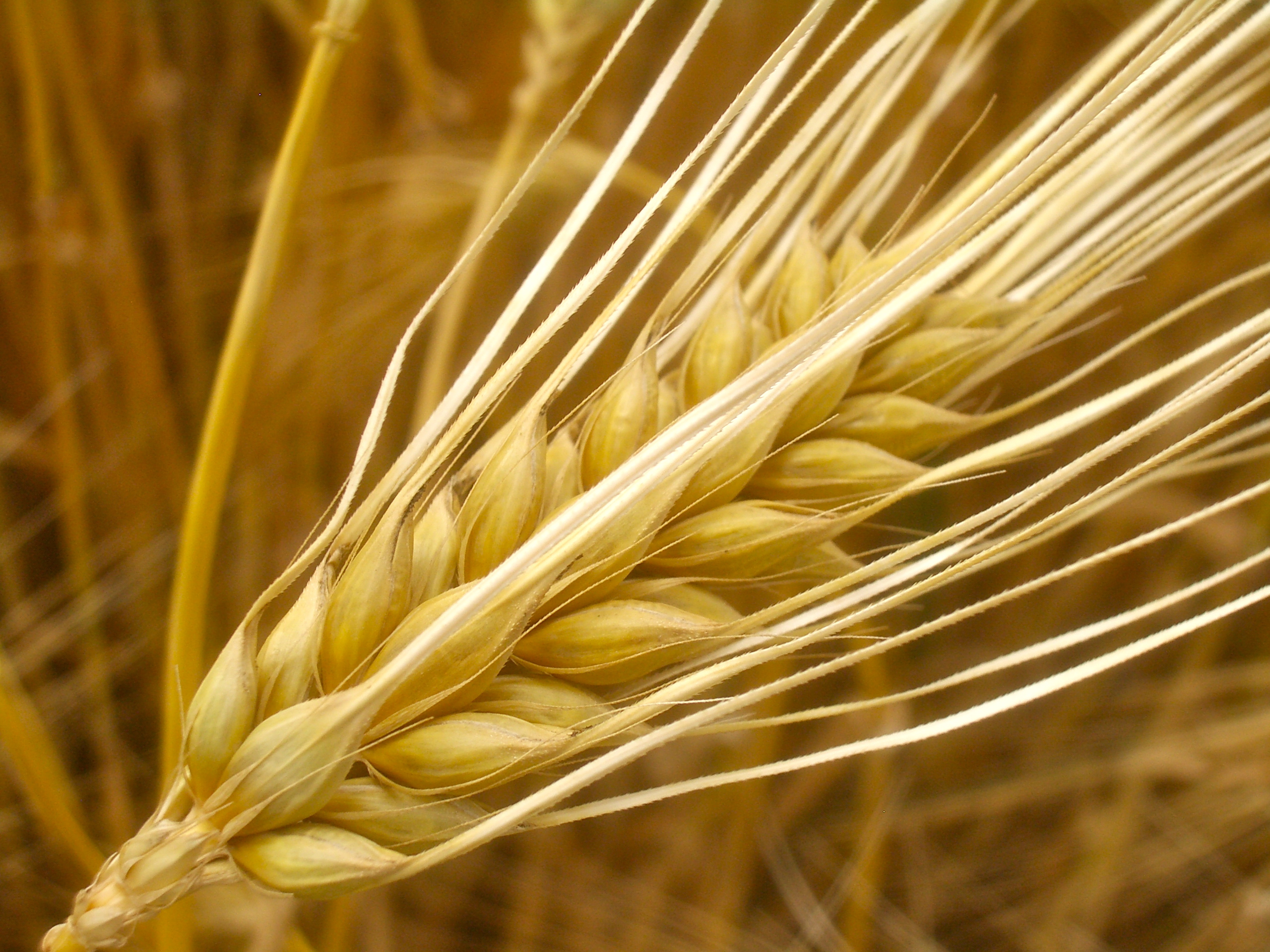 Eine druschreife Ähre der Sechszeiligen Gerste (Hordeum vulgare f. hexastichon) in Franken, Bayern, Deutschland